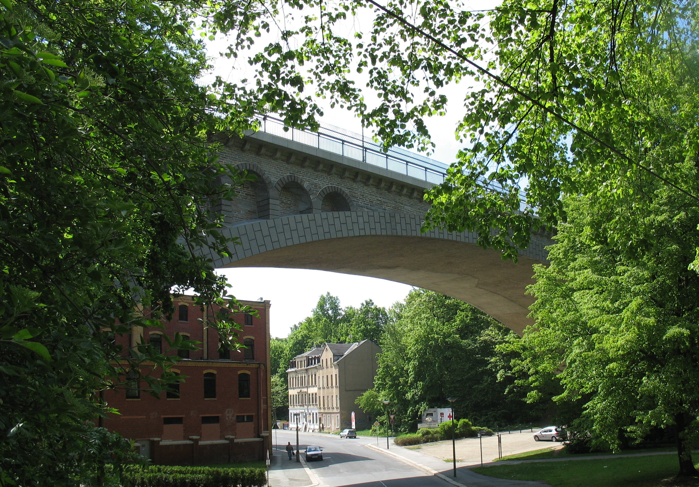 Syratalviadukt in Plauen (Friedensbrücke), Brücke mit einem der weltweit größten steinernen Brückenbögen